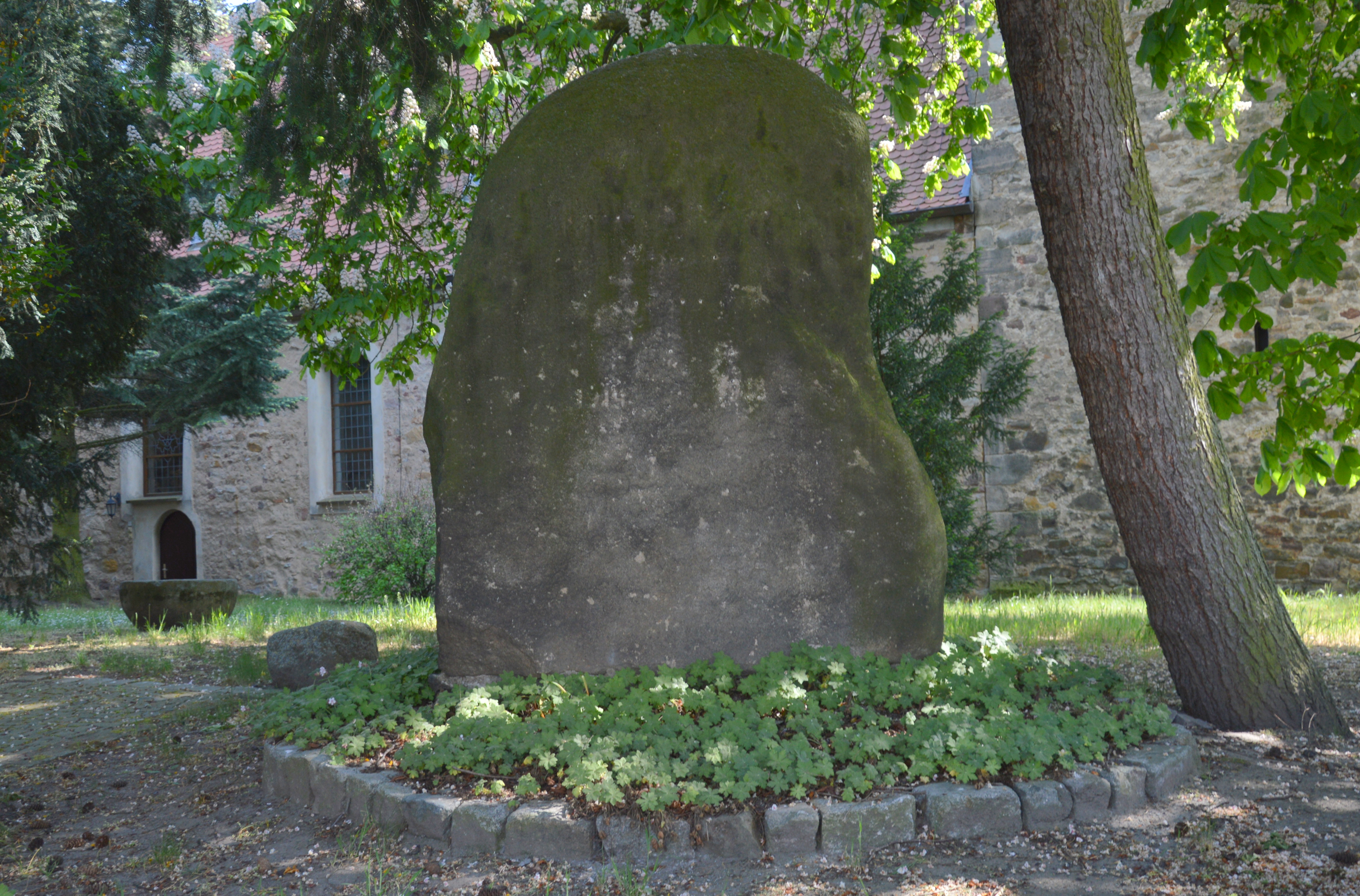 Kriegerdenkmal Cracau, Rückseite